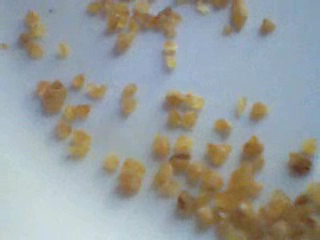 bulgur